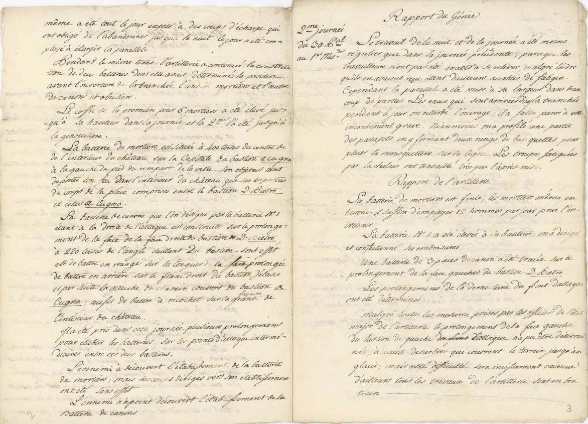 Journal de Jean–Claude Locquin, officier du génie sous Napoléon Ier , qui décrit les tranchées aménagées autour de la citadelle de Milan